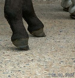 Senfel